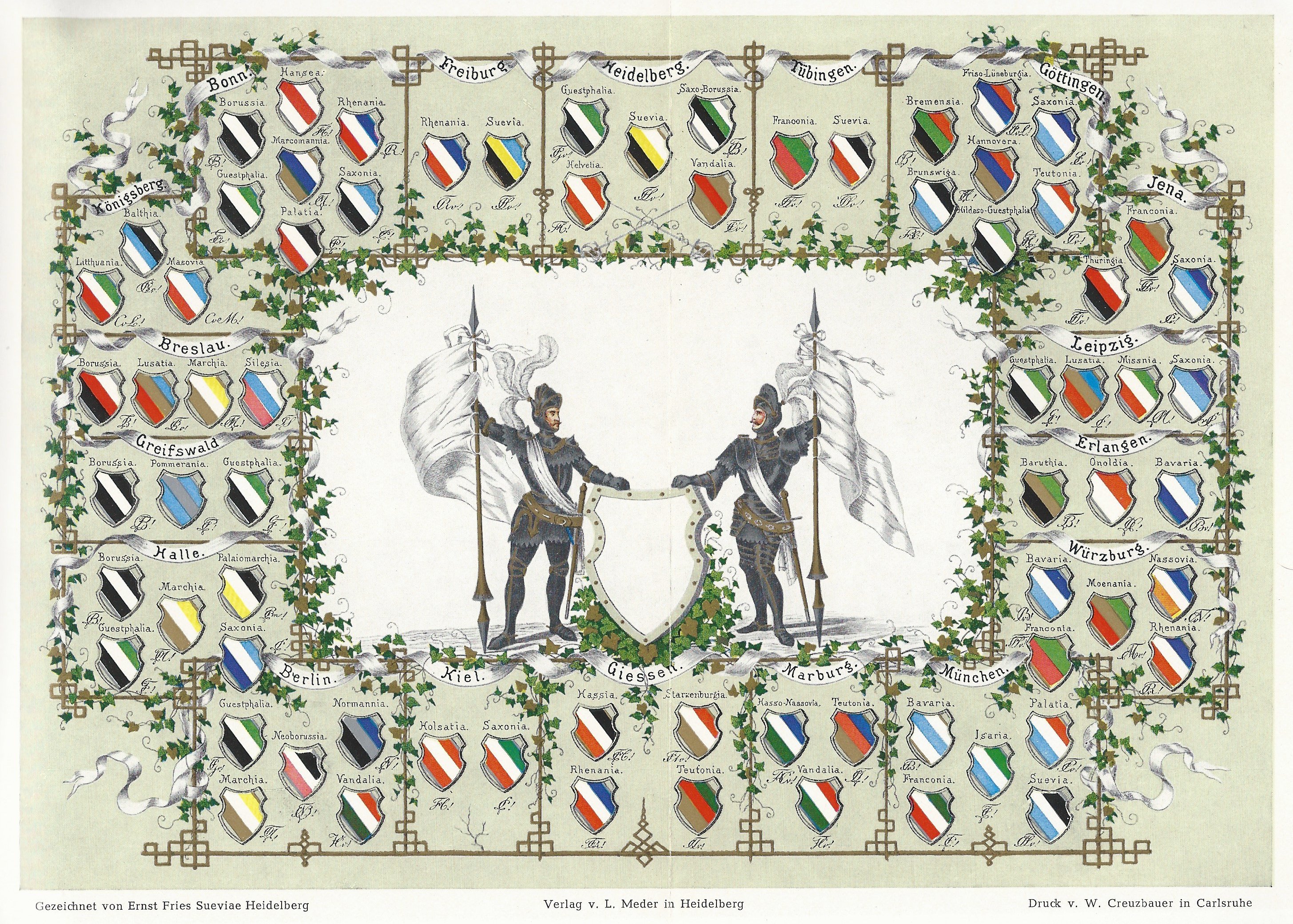 Wappentafel des Kösener Senioren-Convents-Verbandes aus dem Jahr 1859